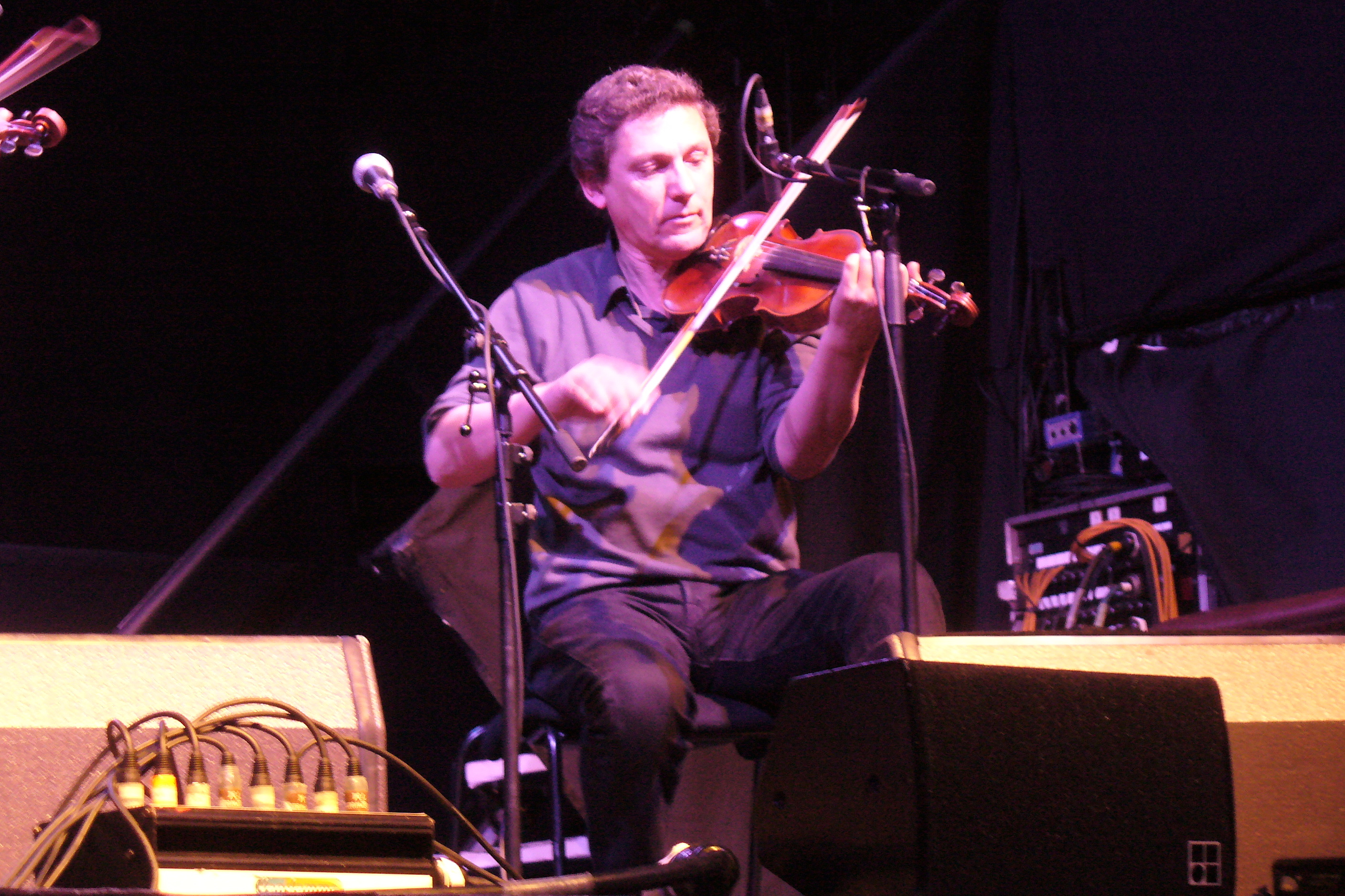 Le violoniste Christian LeMaitre du groupe Pennoù Skoulm au Celtic Connections de Glasgow en 2010.